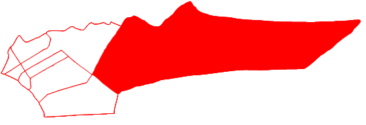 Ubicación de la parroquia Arístides Calvani en el municipio Cabimas, estado Zulia, Venezuela